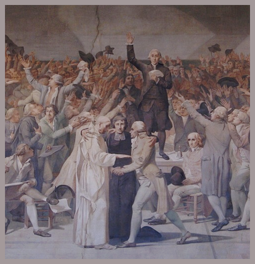 Extrait de : copie du Serment du Jeu de Paume de Jacques Louis David par Luc-Olivier Merson, 1883 Versailles. Cadrage sur dom Gerle (clergé régulier), l'abbé Grégoire (clergé séculier) et Rabaut Saint-Étienne, fils du pasteur Paul Rabaut (protestant).